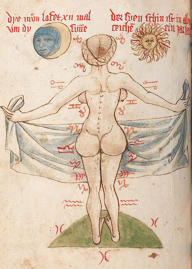 Tübinger Hausbuch, fol. 42v; Württemberg, [15. Jh.]